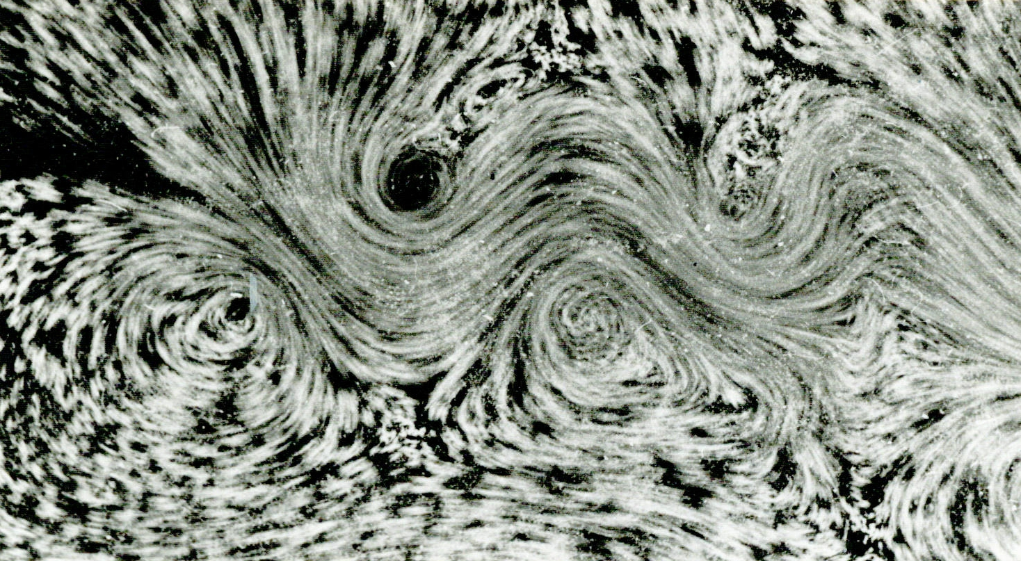 Strömungssichtbarmachung Zylinder wird durch ruhendes Wasser gezogen, auf der Oberfläche Al-Partikel